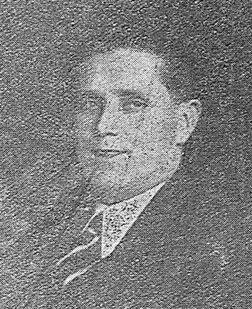 José López Varela, homenaxe en Lugo, 1936